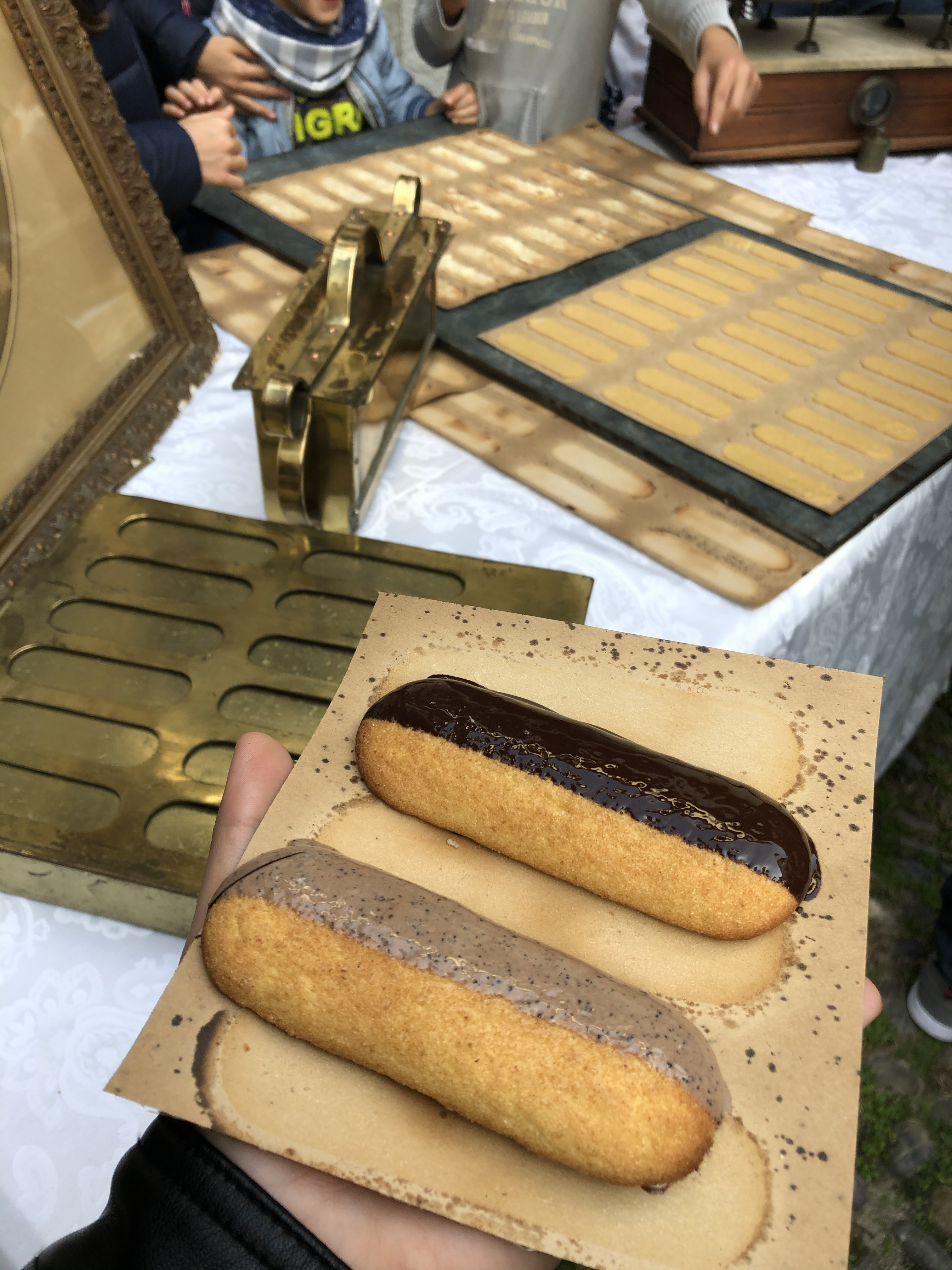 Biscotti tipici novaresi This photo has been taken in the country: Italy